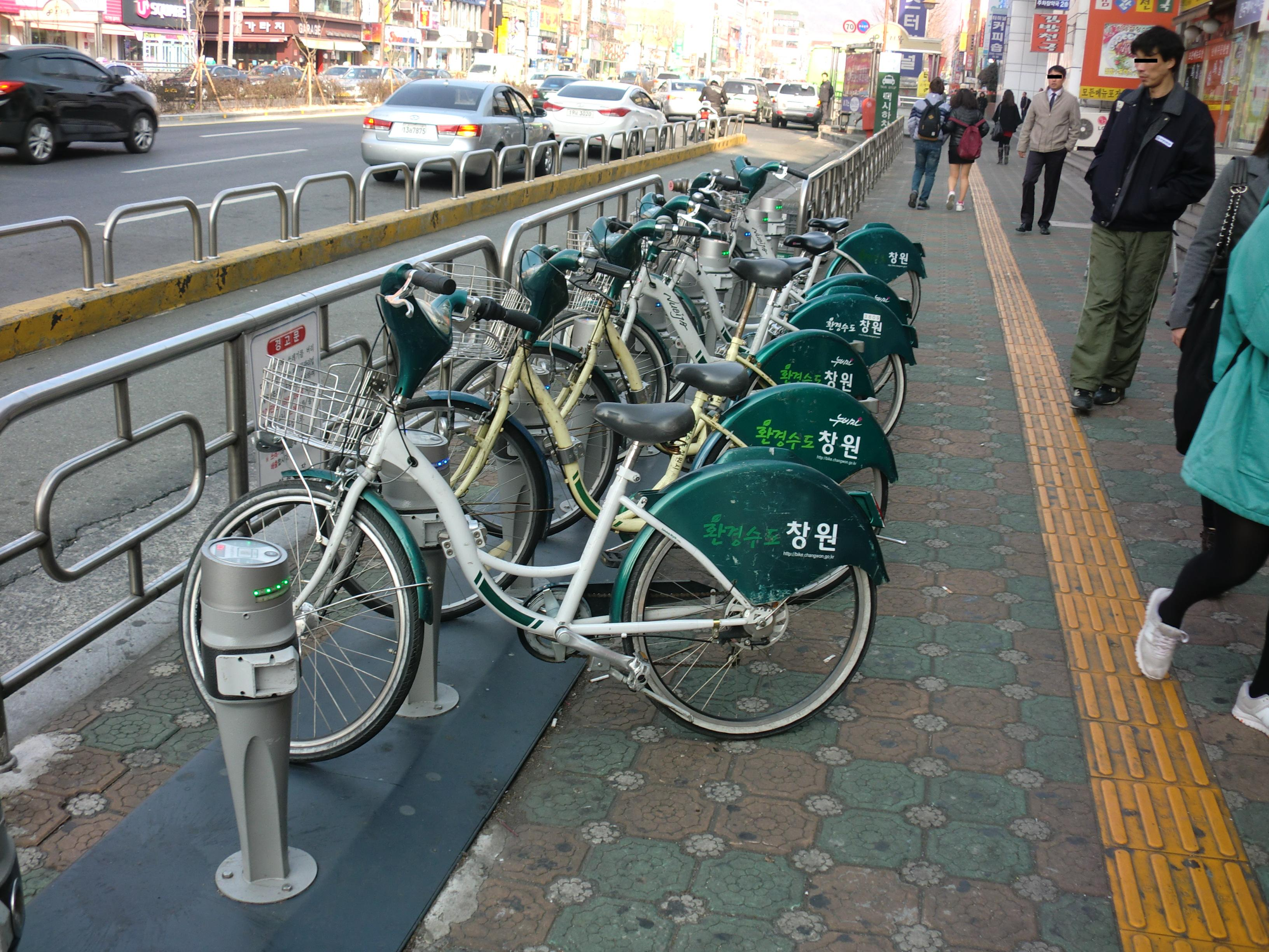 경상남도 창원시의 무료 대여자동차 서비스 (마산시외버스터미널 앞)